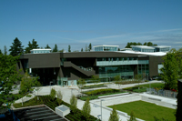 Langara College, Vancouver BC